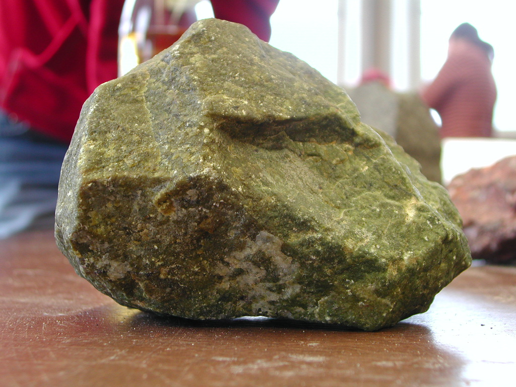 Urheber: Selbst geschossen